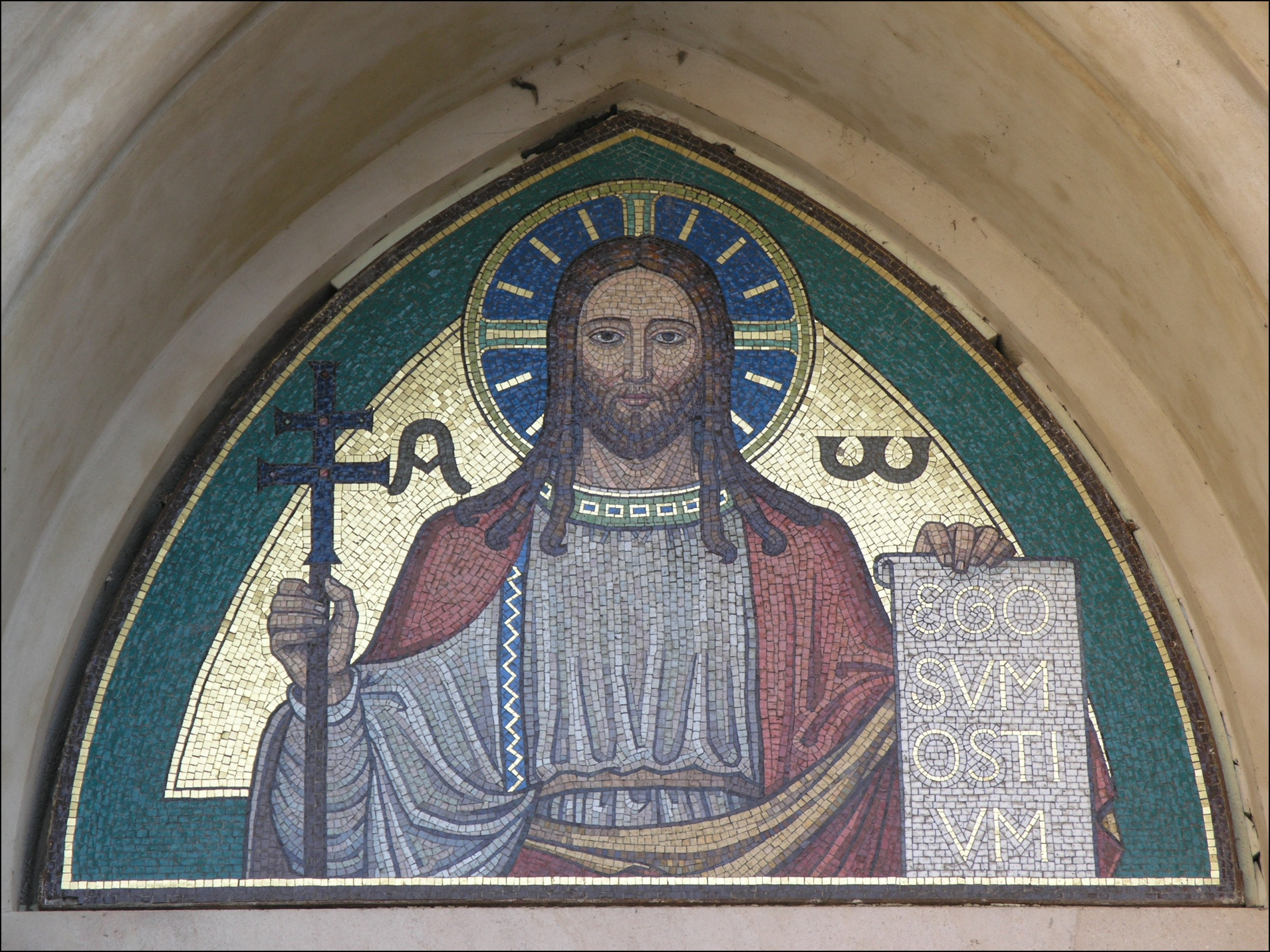 Viktor Foerster, Kristus Spasitel, Praha, Nové Město - kostel Panny Marie na Slovanech